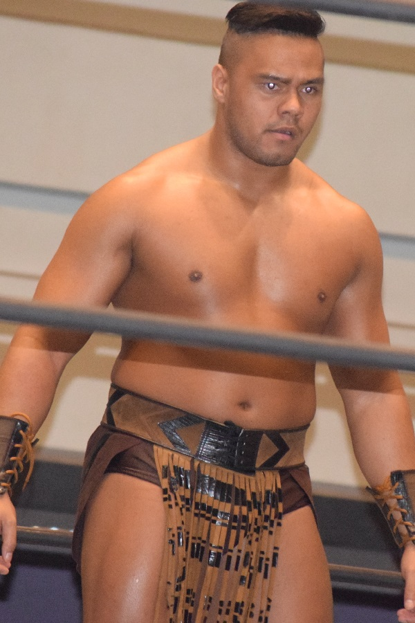 2018年3月1日 大阪府立体育会館・第二競技場 「旗揚げ記念シリーズ」 トーア・ヘナーレ